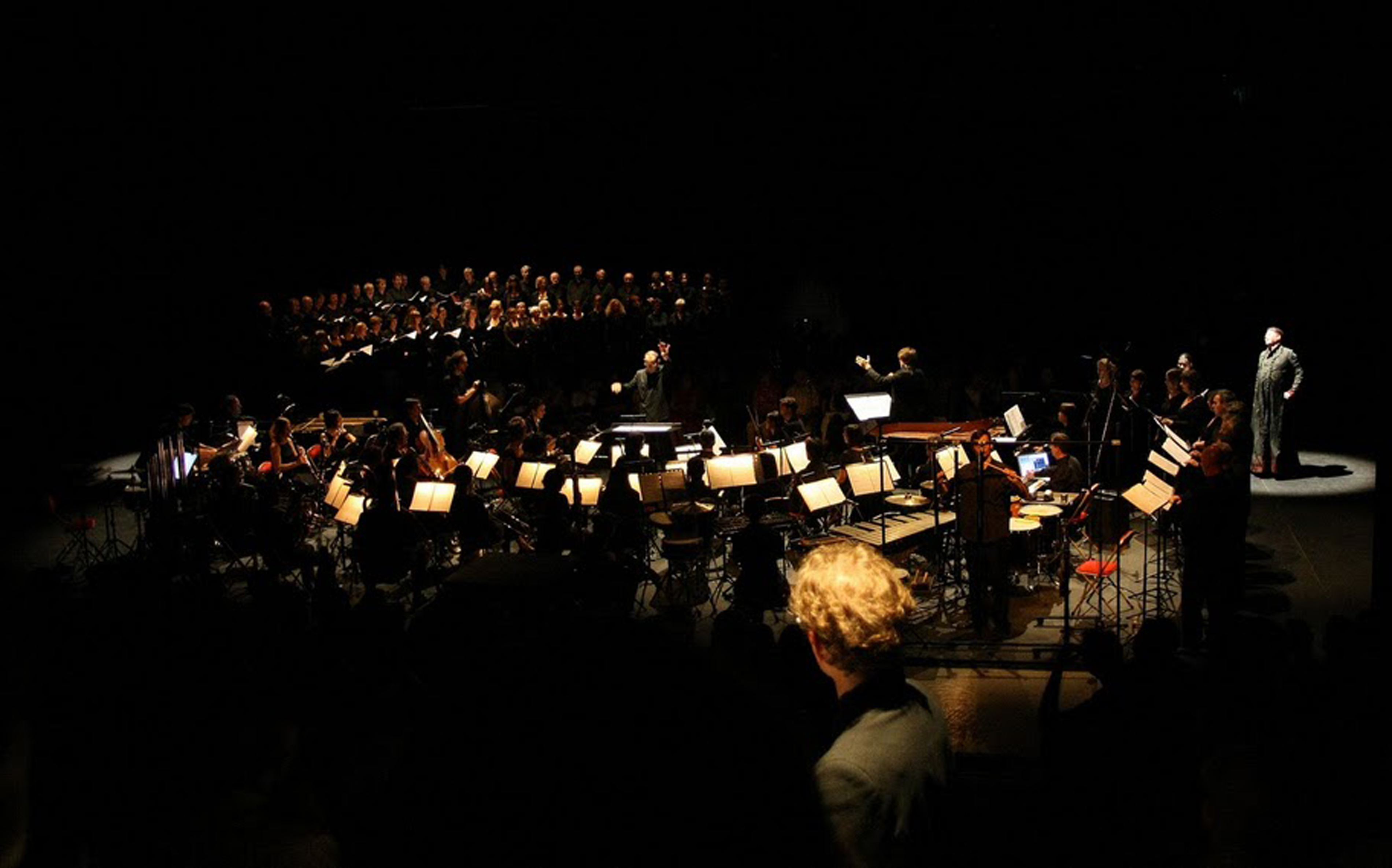 Bacchanales Projet professionnels-amateurs